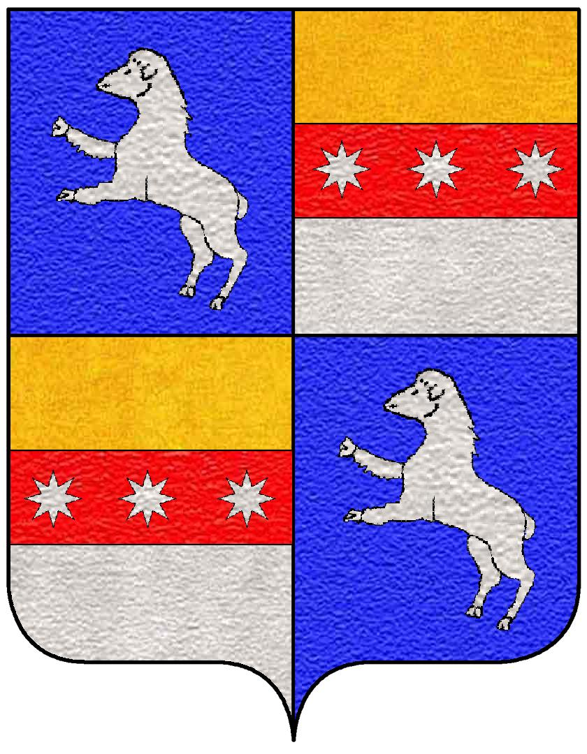 Stemma della famiglia Agnelli